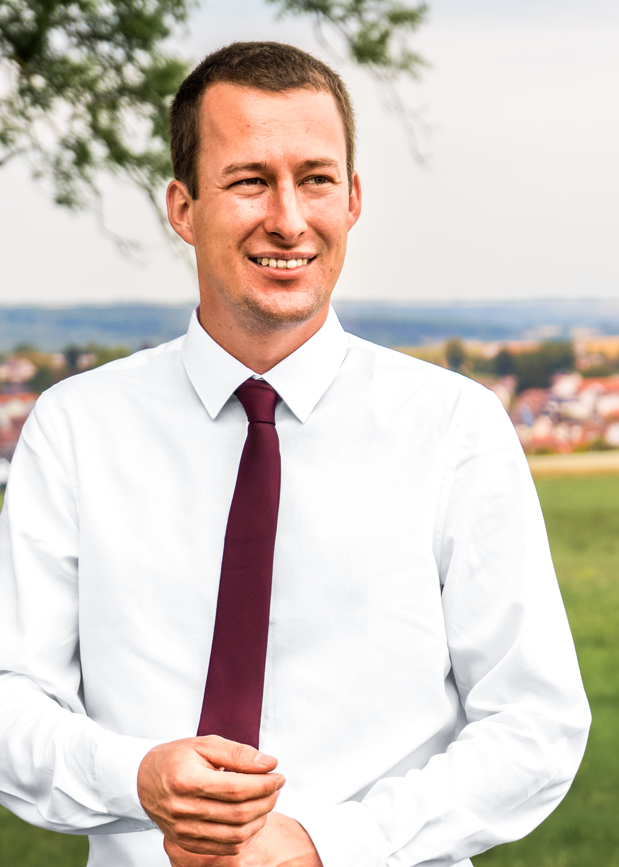 Offizielles Wahlkampfportrait von Fabian Fehl im Wahlkampf 2019, seit 2020 Bürgermeister der Gemeinde Birstein.